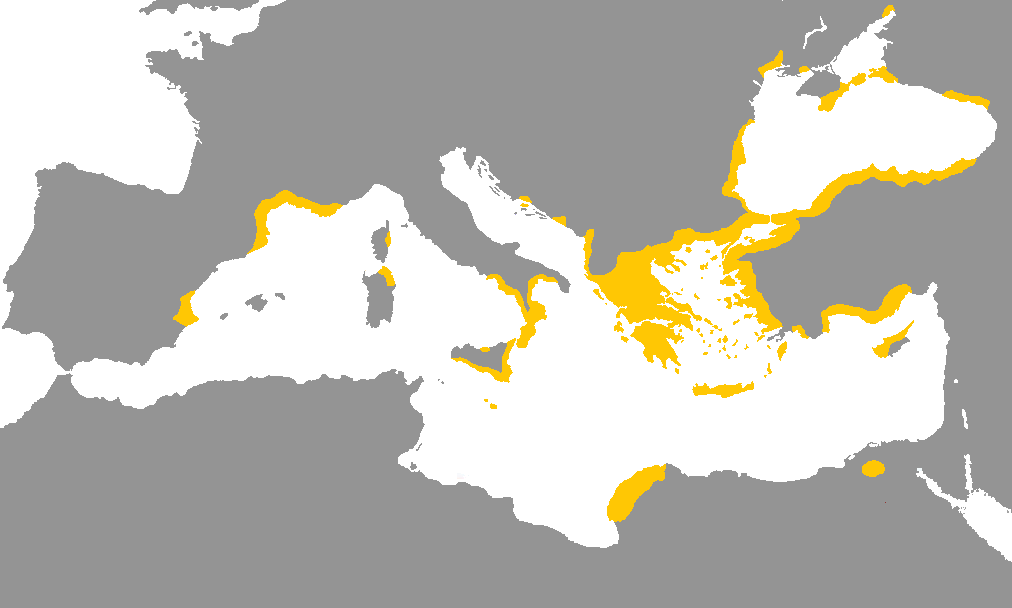 Idioma griego antiguo